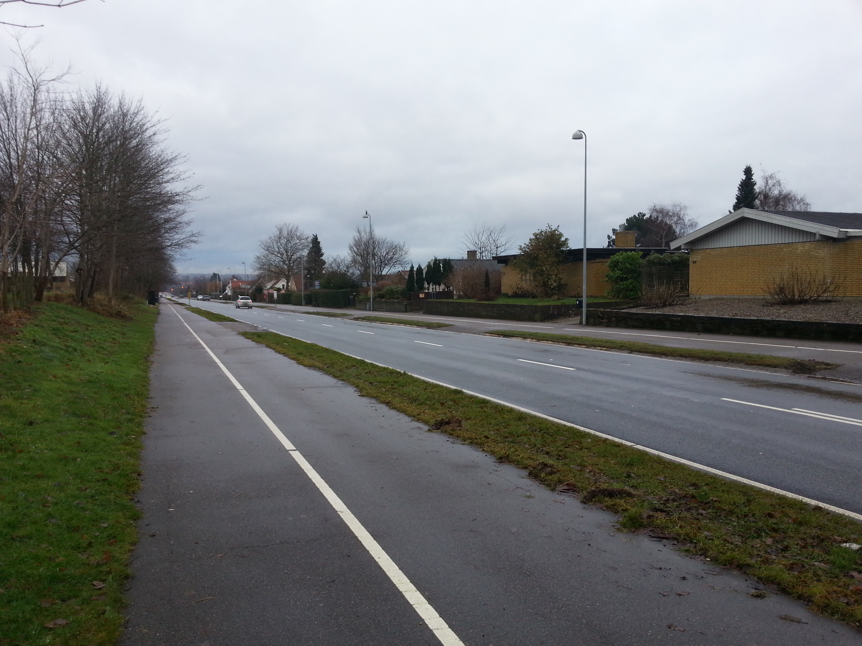 Hovvej i Espergærde. Sydlige ende.